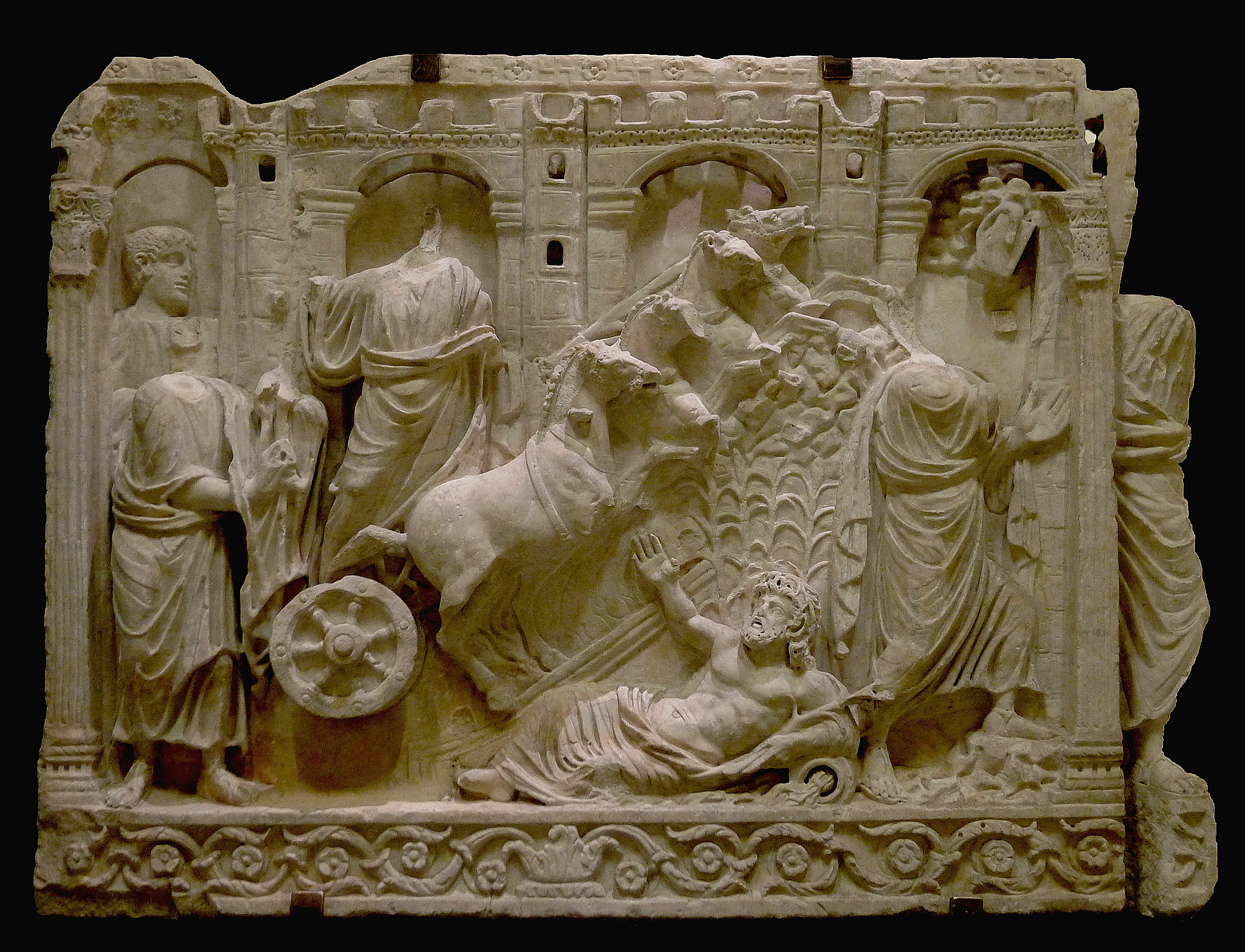 Sarcophage « à portes de ville » dit de la Remise de la Loi (Traditio legis). Face latérale droite : ascension du prophète Elie remettant son manteau à son disciple Elisée.